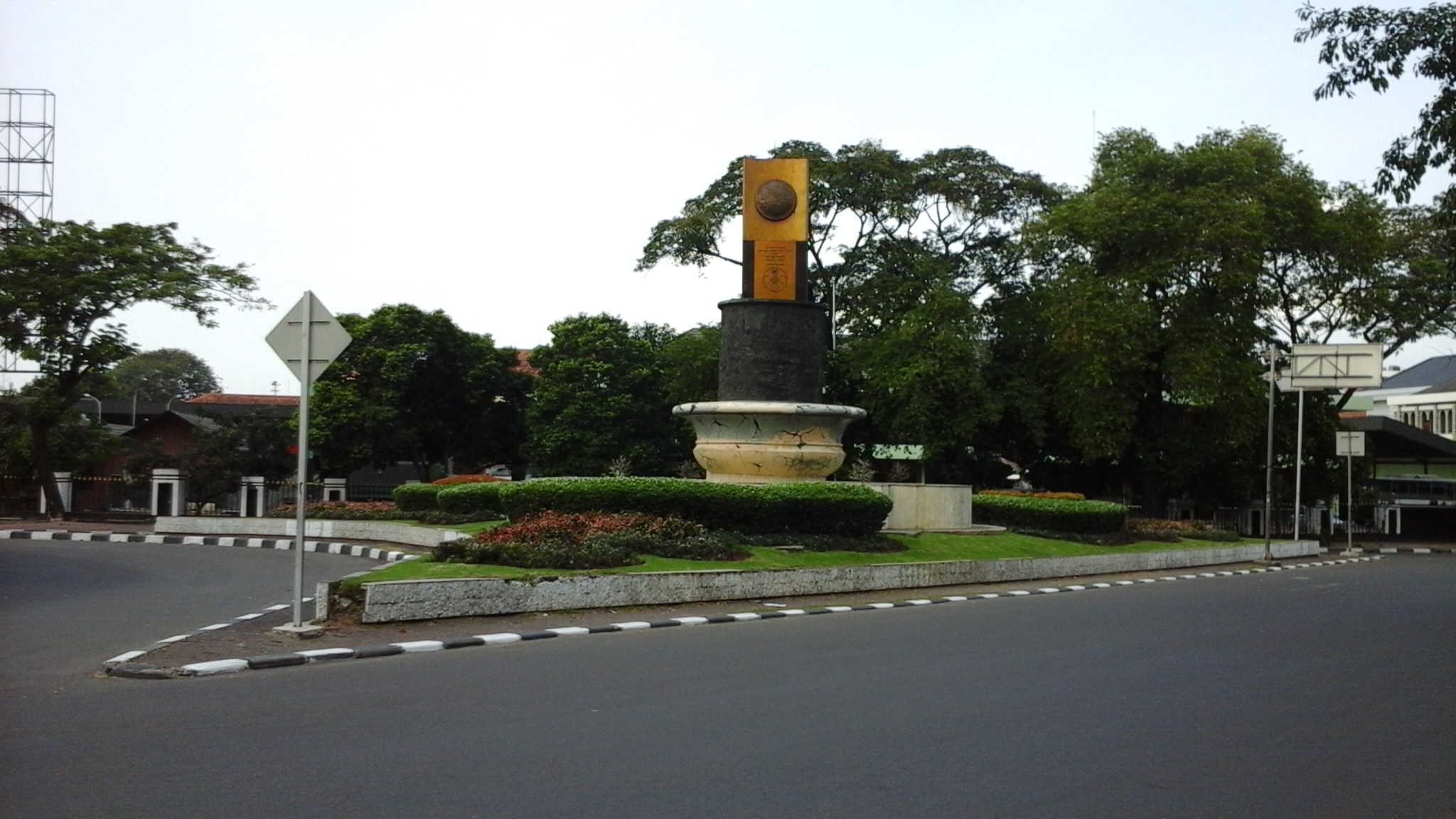 Piala Adipura yang diraih Jakarta Pusat pada 1997.